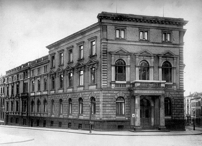 Ehemaliges Landratsamt in der Zollernstraße 10 in Aachen-Burtscheid; Im 2 WK zerstört; Architekt: Eduard Linse; Erbaut zw. 1890 und 1892